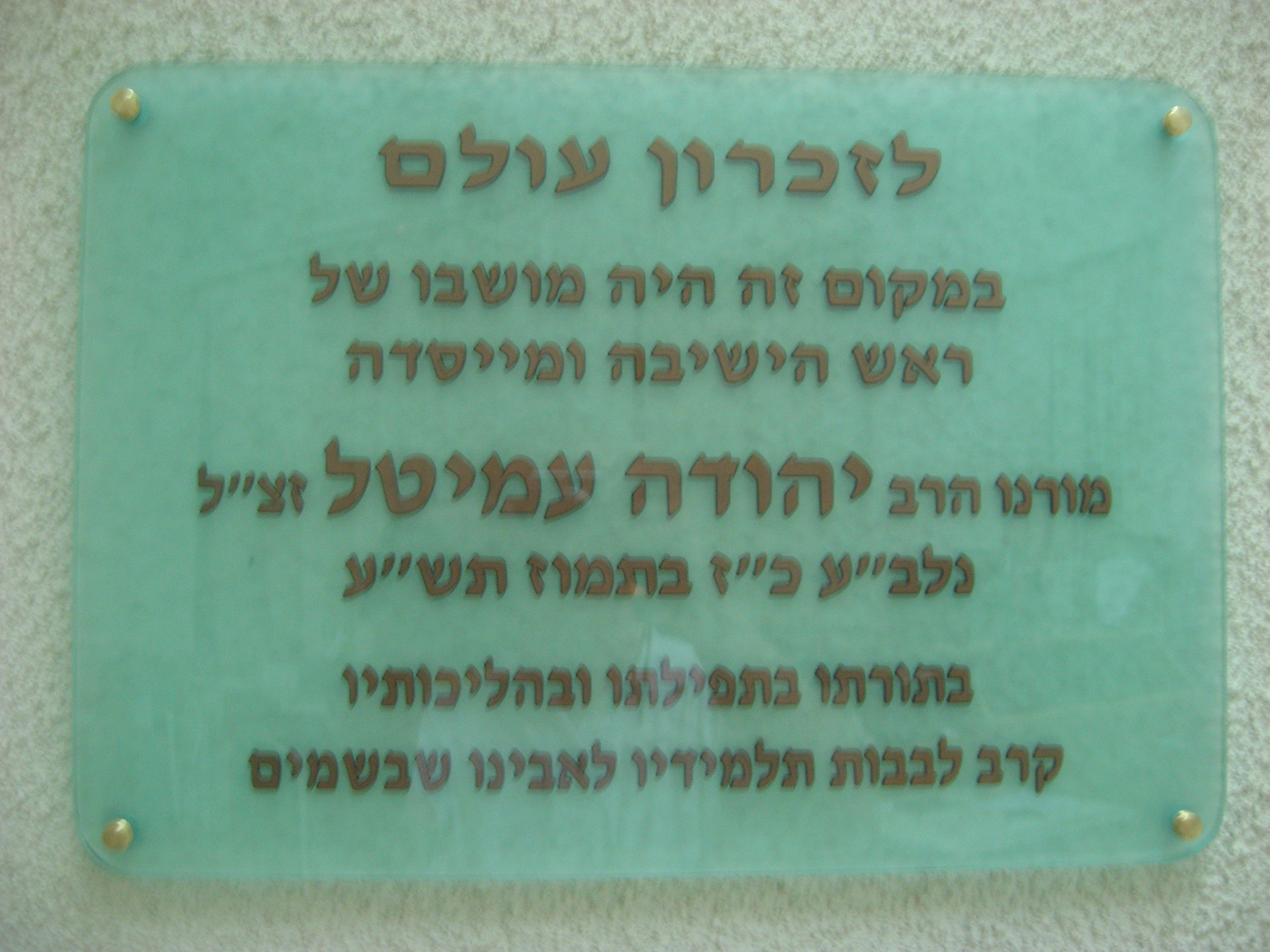 שלט שהוצב במקום מושבו של הרב יהודה עמיטל זצ"ל בבית המדרש של ישיבת הר עציון, ביום השנה לפטירתו